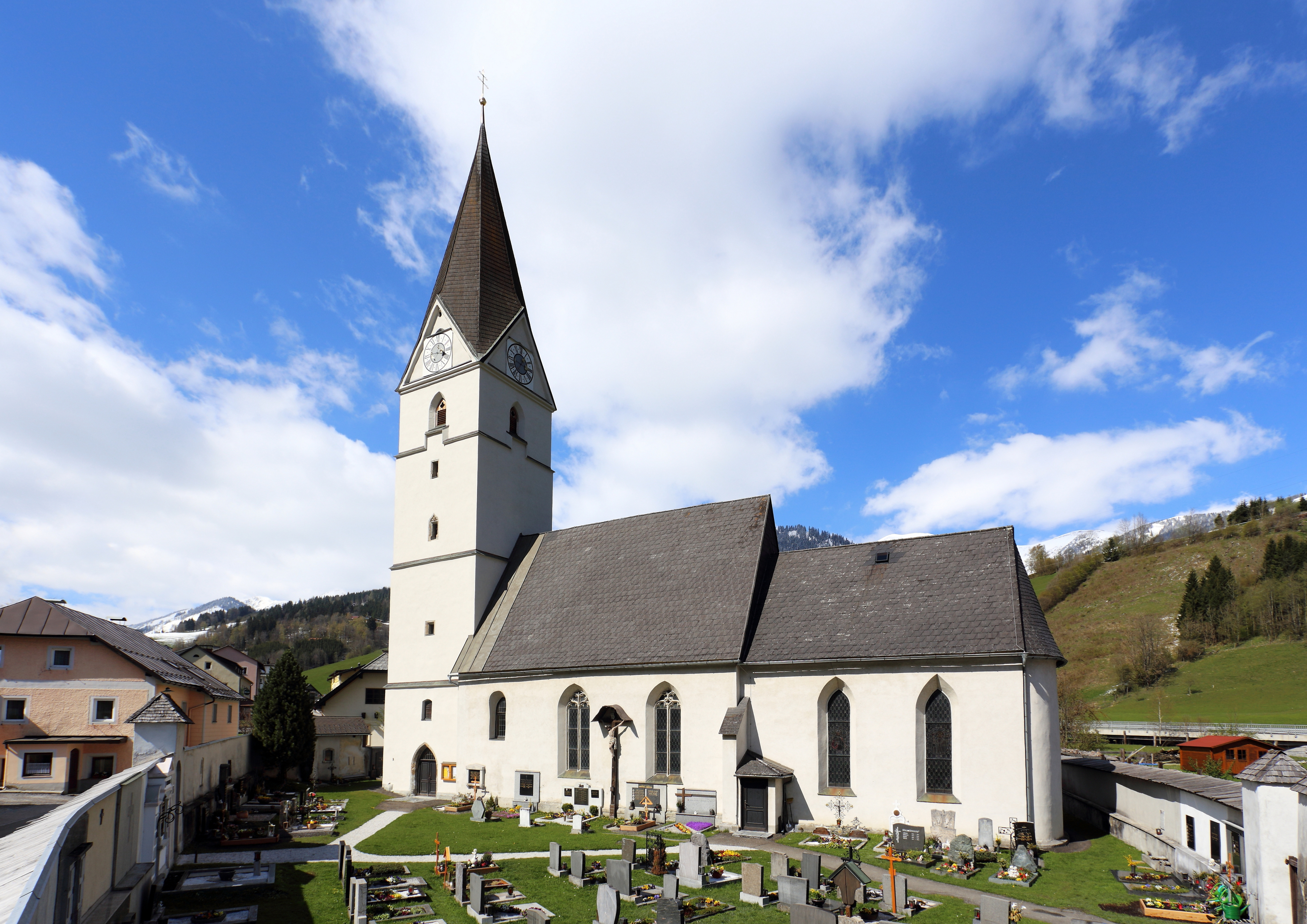 Südansicht der katholischen Pfarrkirche hl. Kunigunde in der steiermärkischen Gemeinde Wald am Schoberpaß. 1450 wurde die 1402 urkundlich erwähnte Kirche umgebaut und in gotischer Form erweitert. Zwischen 1784 bis 1788 wurde der Chor Richtung Osten erweitert und der Sakristeianbau errichtet.